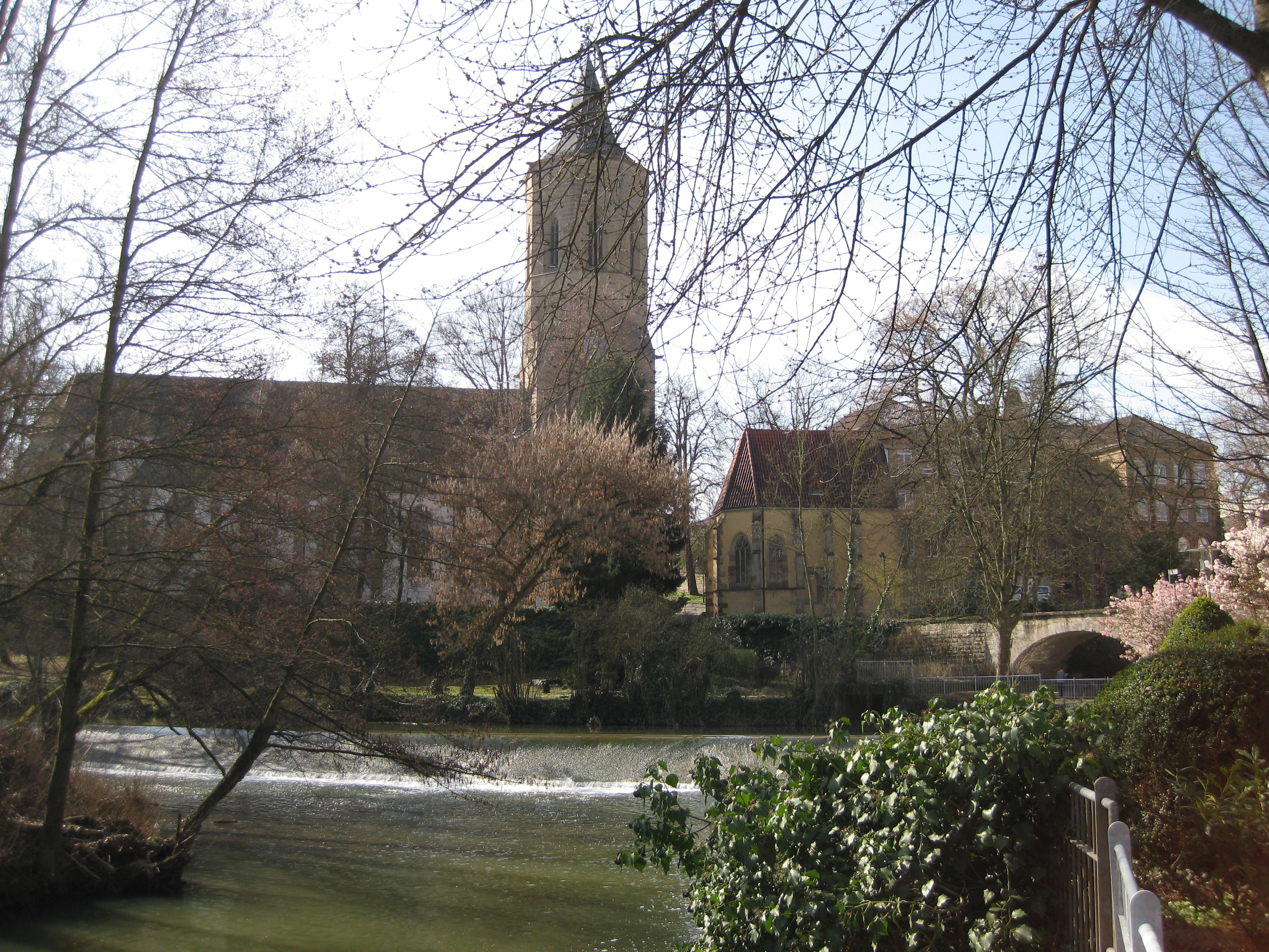 Waiblingen Rems Michaelskirche 2017